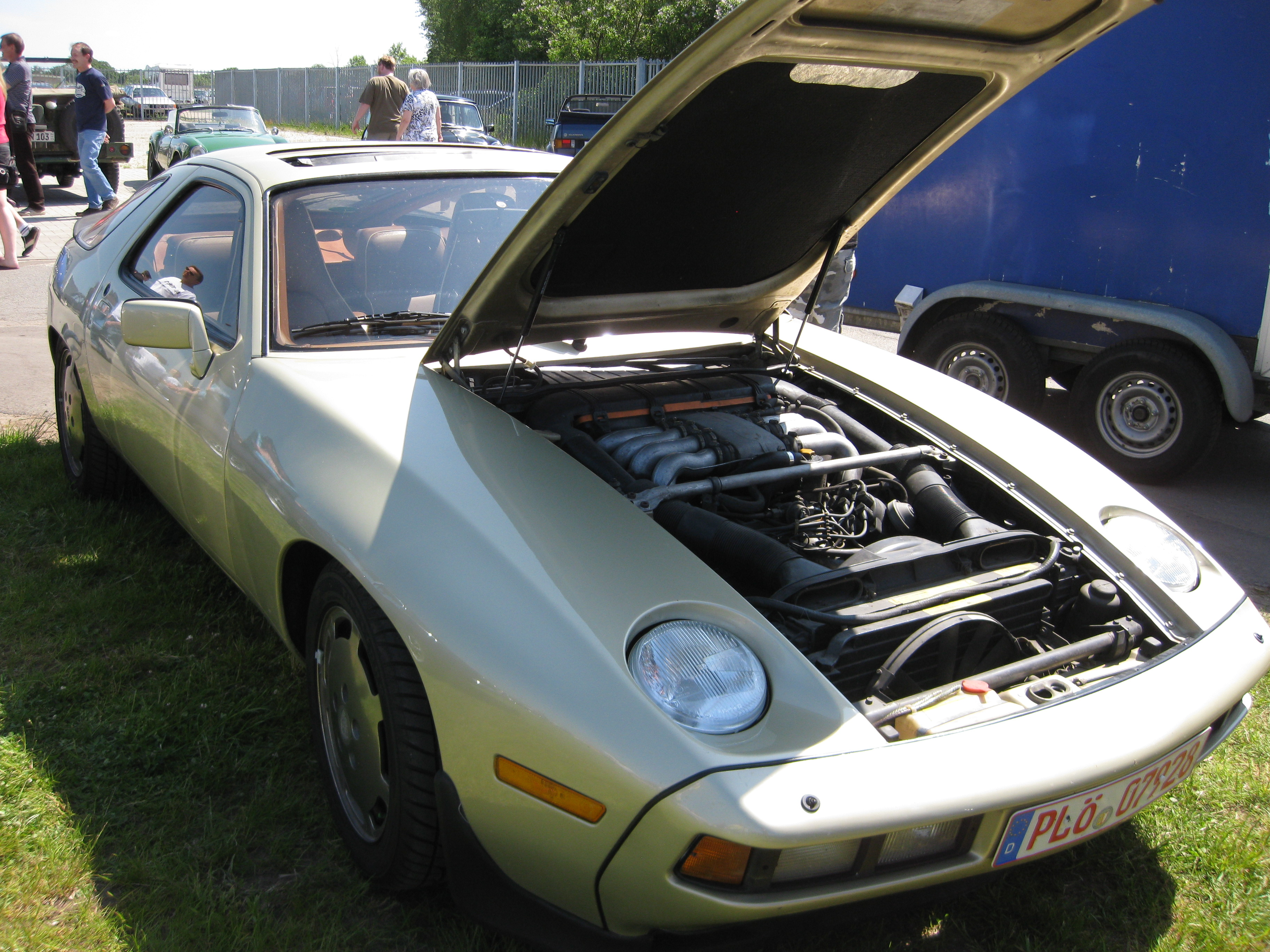 Porsche 928 Motorraum